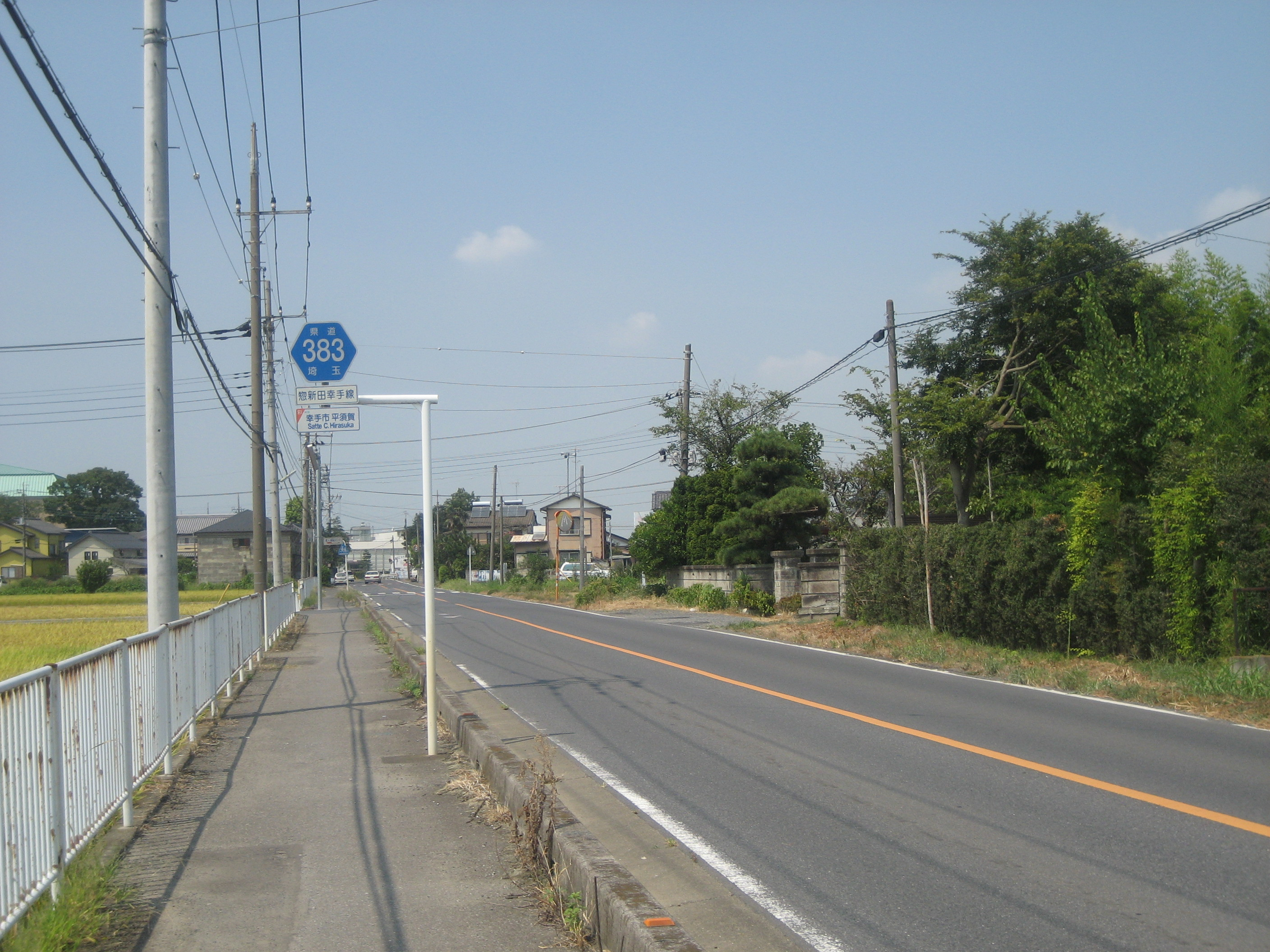 埼玉県道383号線幸手市内国道4号線方面を撮影